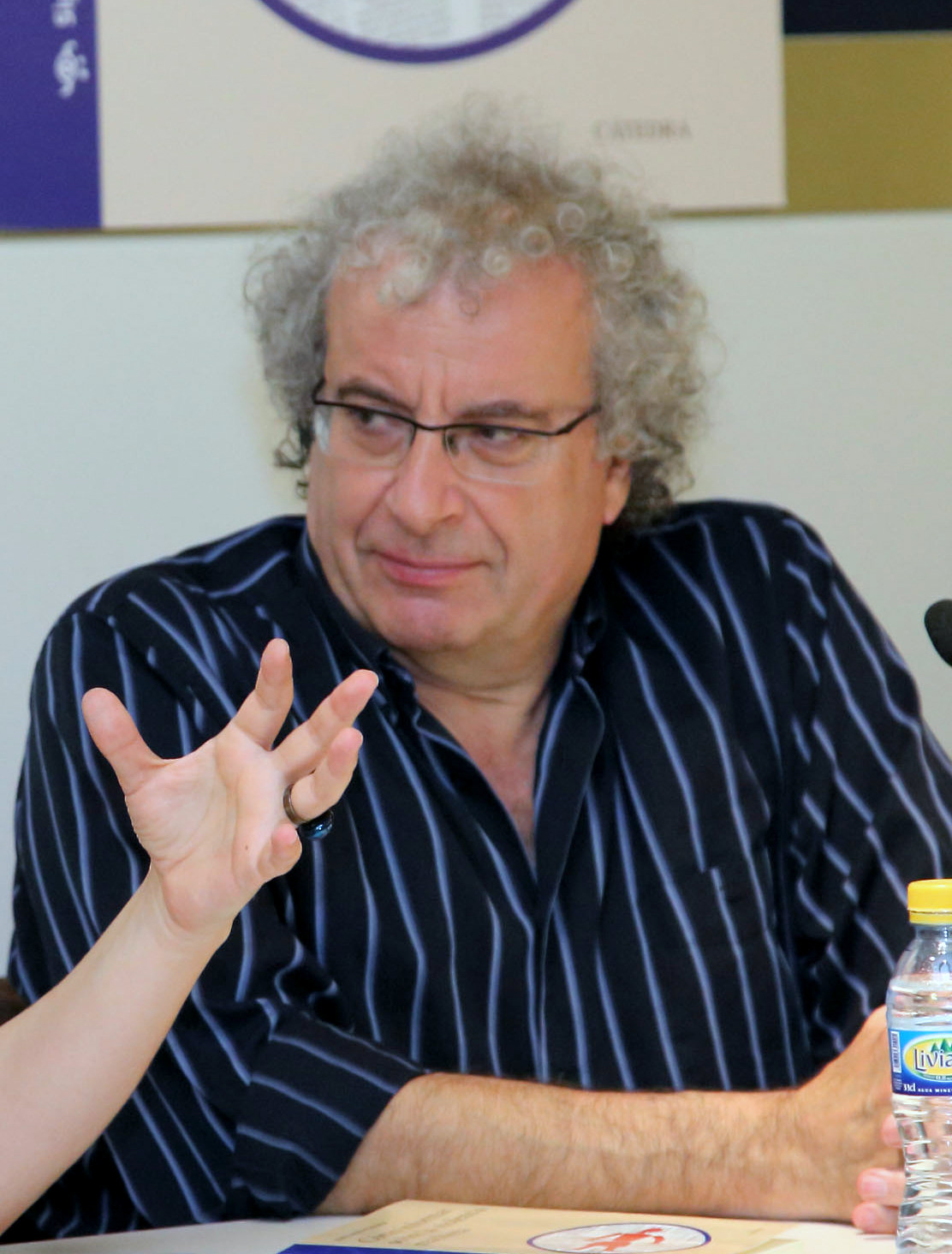 La directora del Instituto de la Mujer de Castilla-La Mancha, Araceli Martínez, durante la presentación del libro Cómo informar sobre violencia machista junto a su autor el periodista José María Calleja, en el salón de actos de la Dirección General de Tributos, en Toledo. (Foto: Álvaro Ruiz // JCCM)